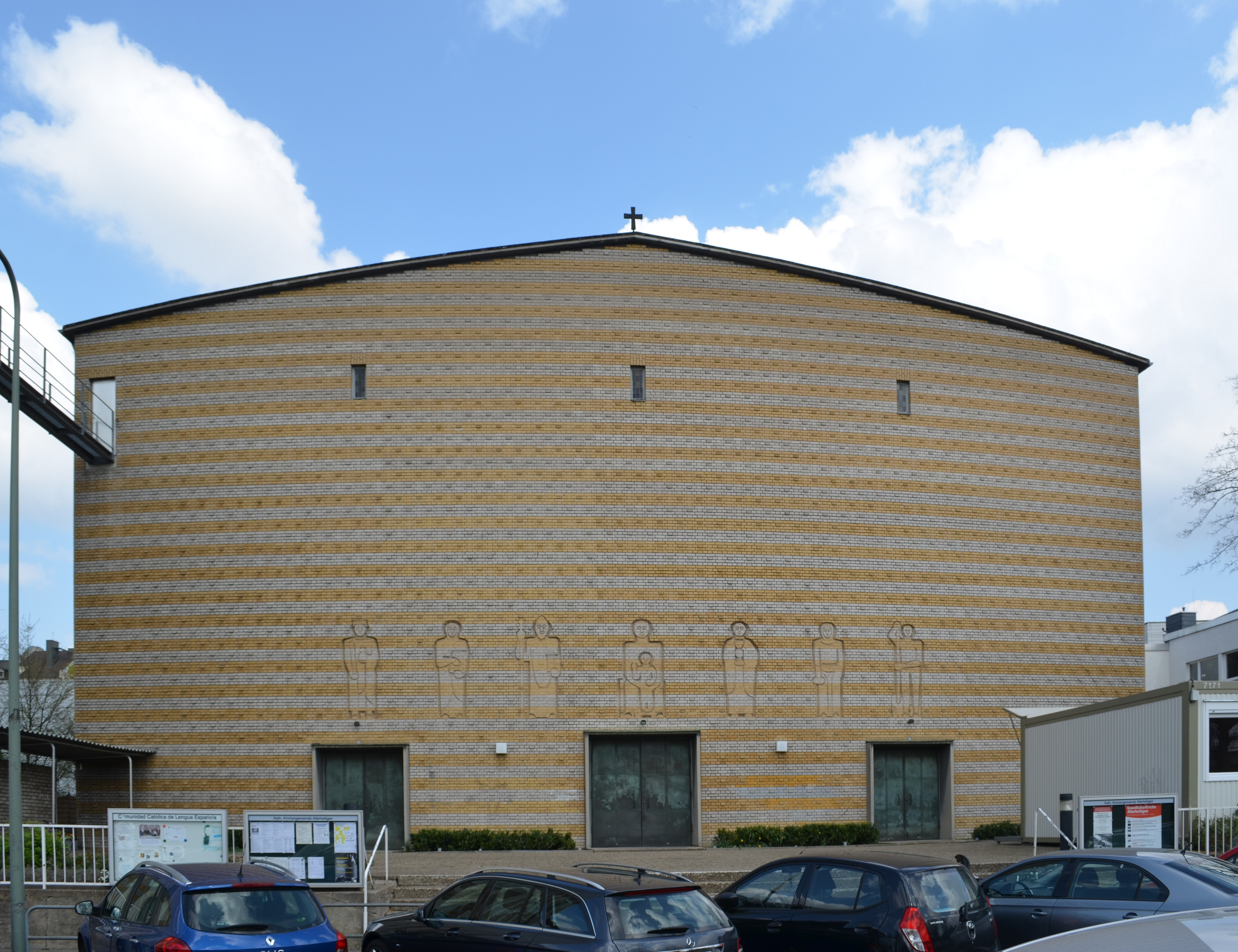 Frankfurt, Allerheiligenkirchem Front